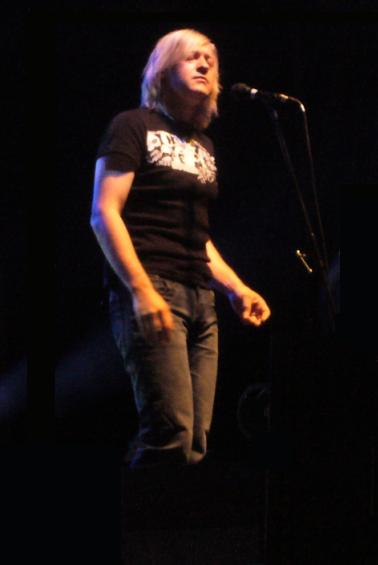 Artur Gadowski podczas koncertu w 2007 roku